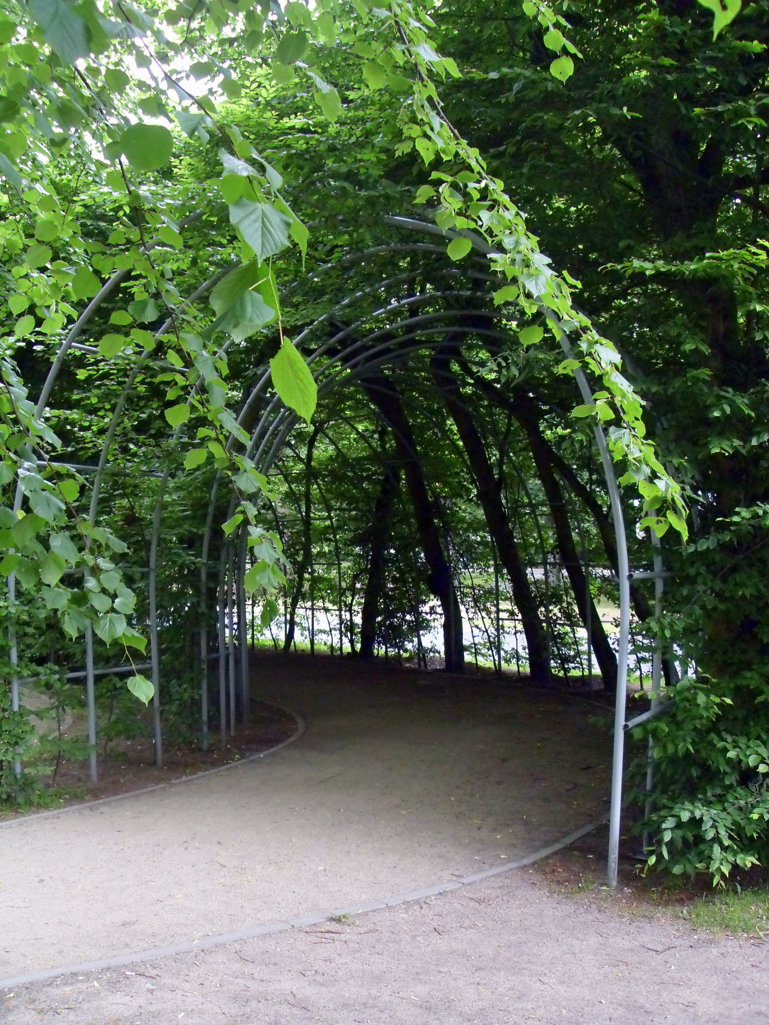 Bindaż w Kołobrzegu.